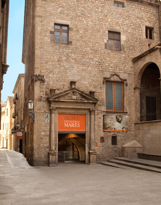 Entrada Museu Frederic Marès